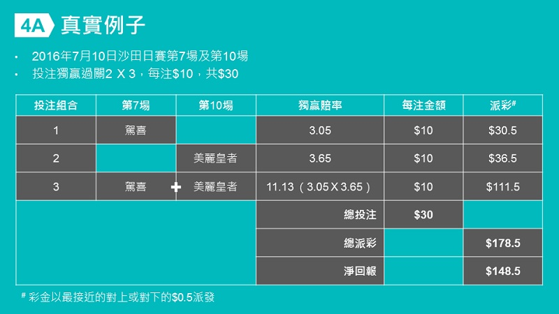 過關真實例子